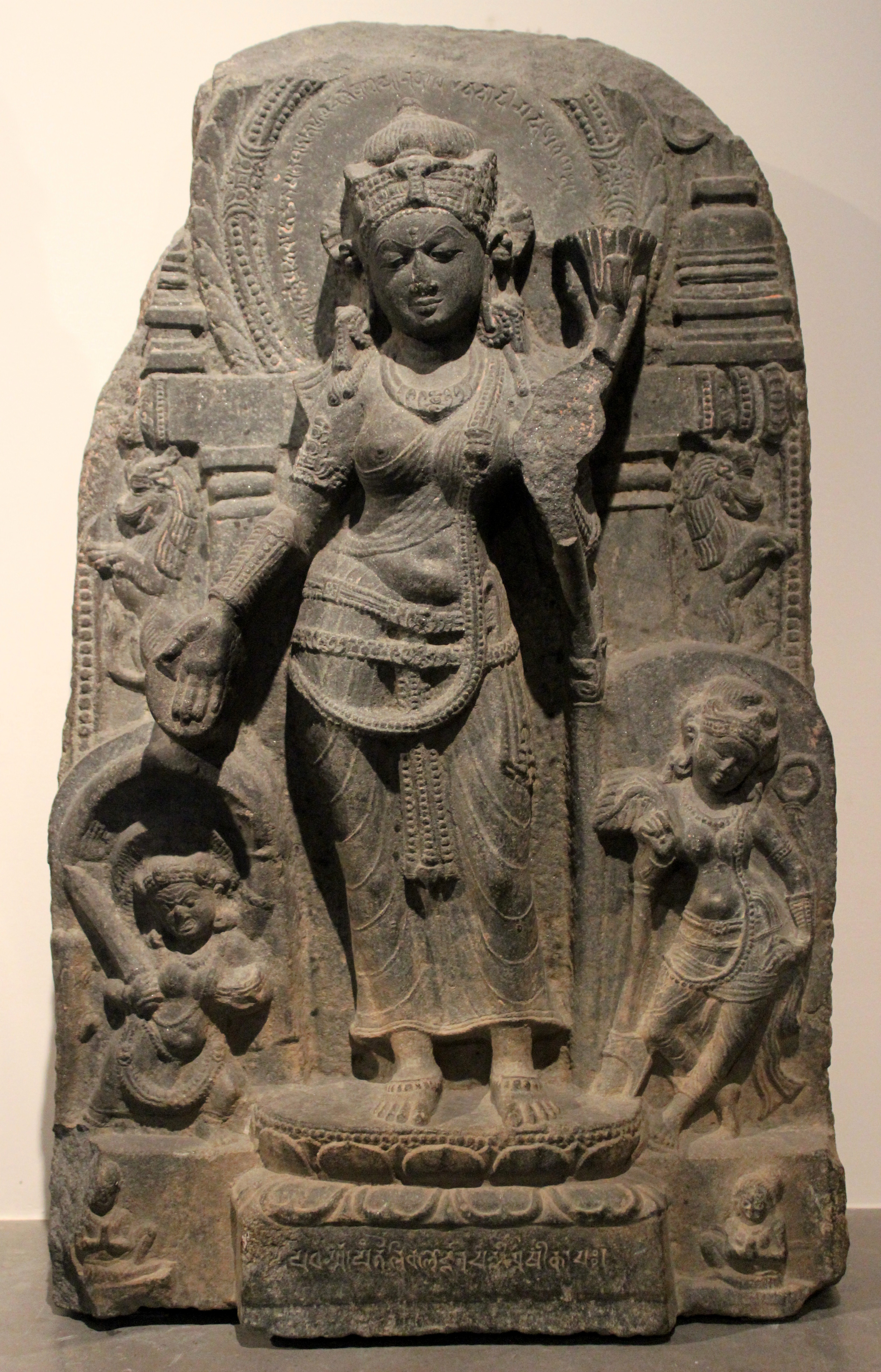 Musée Guimet. Tara, s. IX.